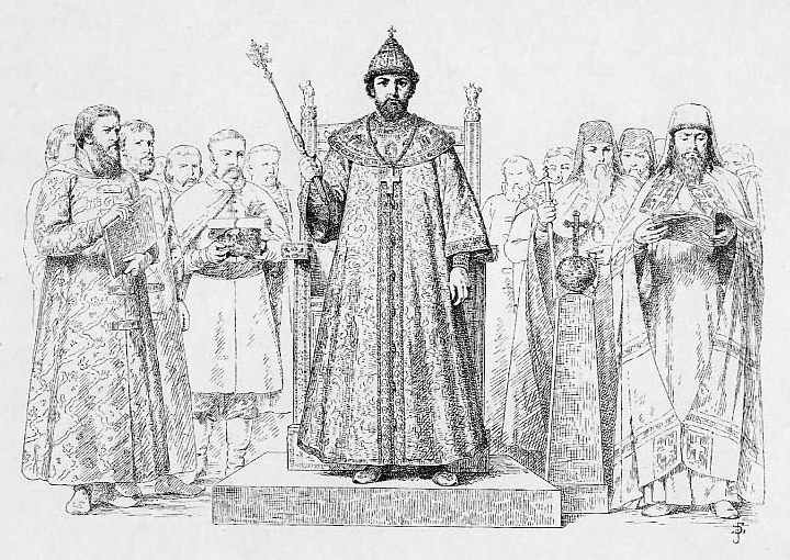 Самодержец Царь Алексей Михайлович. 1645-1676 г.Царствование сына Михаила Федоровича, Алексея Михайловича, за кротость и доброту прозванного Тишайшим, известно изданием Соборного Уложения, исправленным [заботами Патриарха Никона] церковных книг и присоединением, при посредстве Богдана Хмельницкого, Малороссии. Мягкая и добродушная природа Самодержца привлекала общее к нему сочувствие.